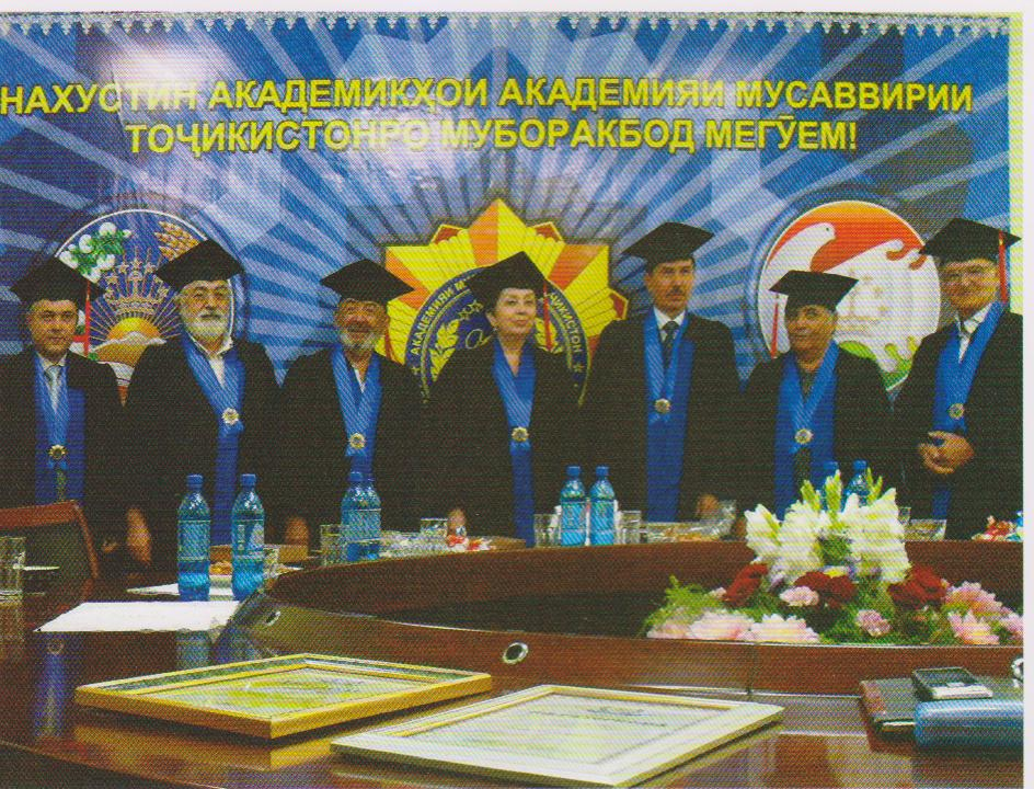 Члены академии, Академия художеств Таджикистана